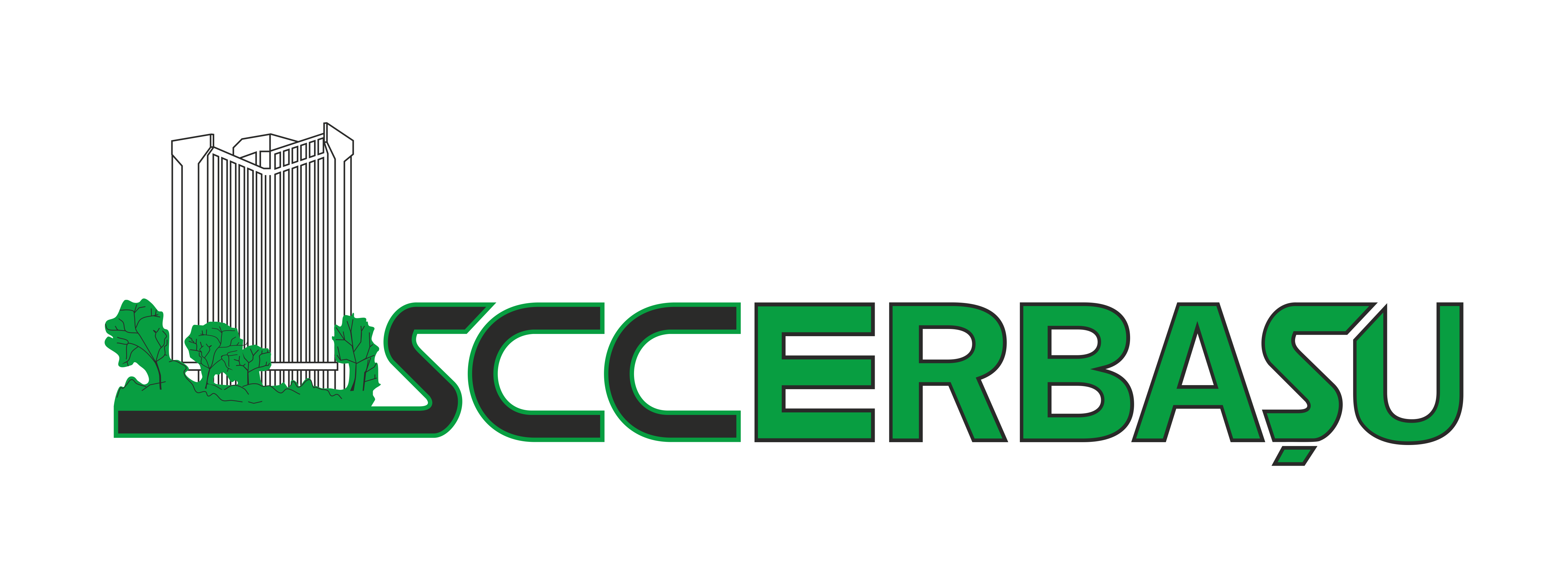 Logo Constructii Erbasu